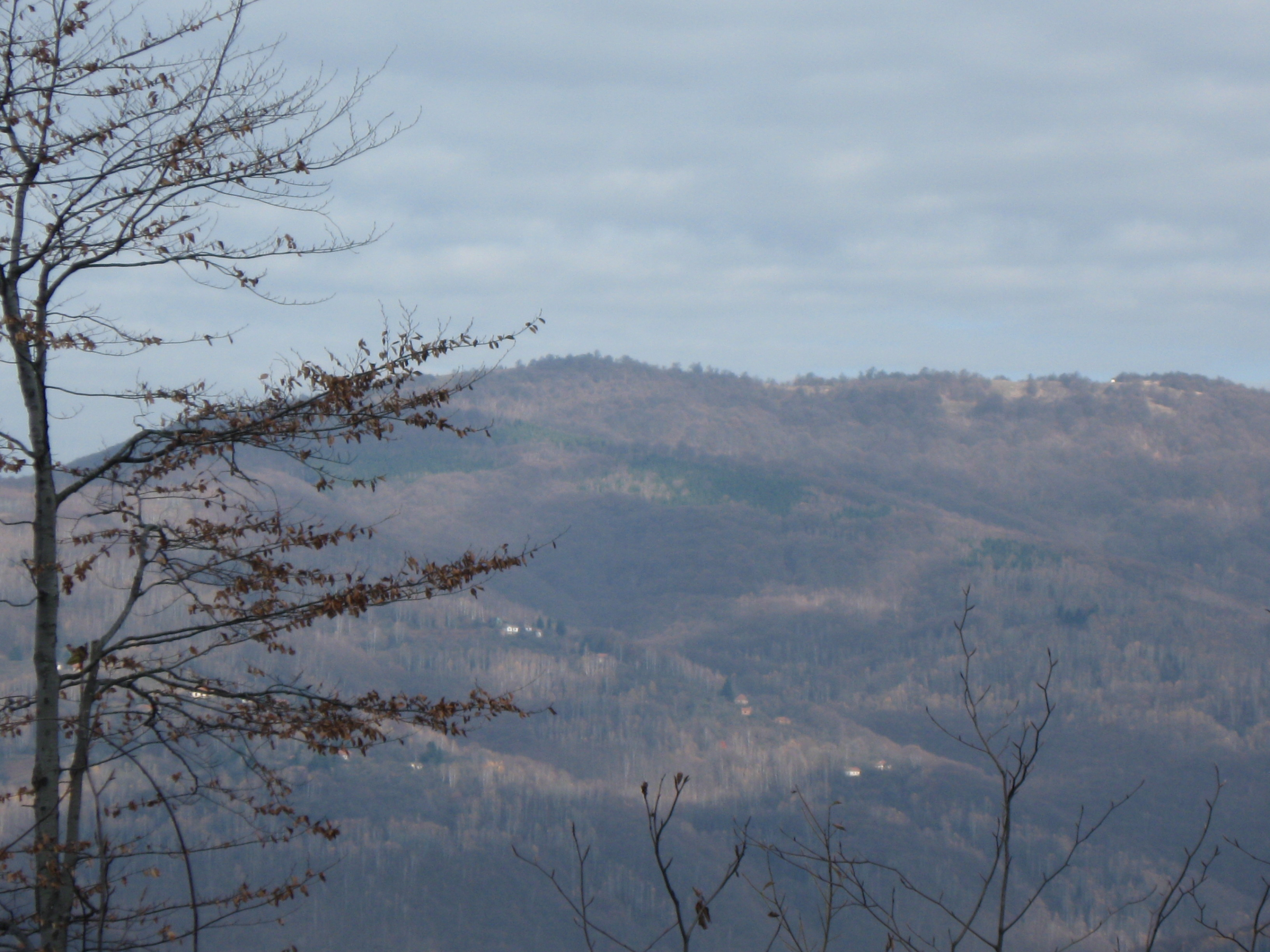 Село Острозуб на планини Острозуб.